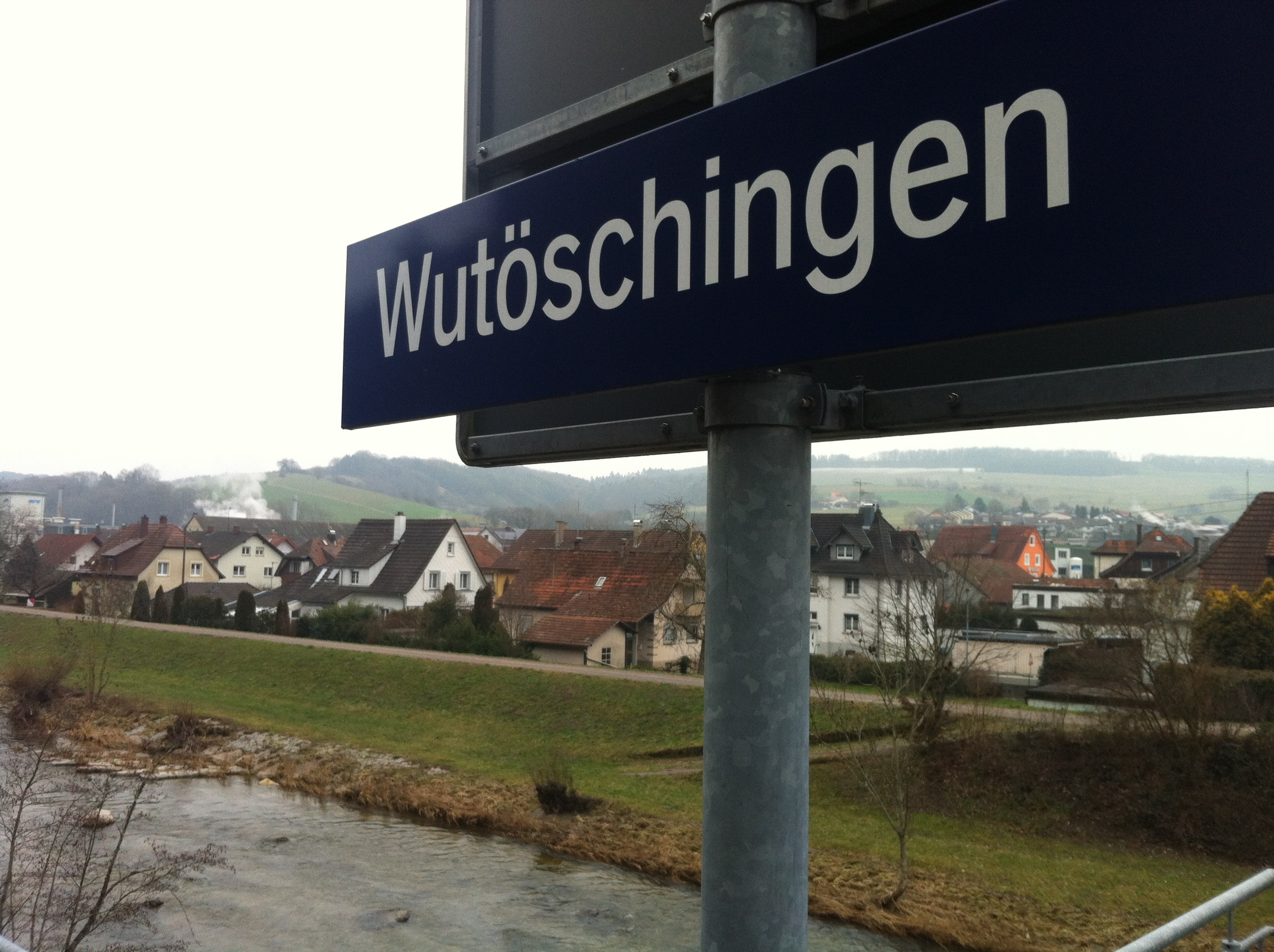 Bahnbetriebe Blumberg Strecke Wutachtal Station Wutöschingen, Schriftzug. Landkreis Waldshut in Baden-Württemberg